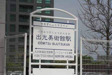 出光美術館駅駅名標です。